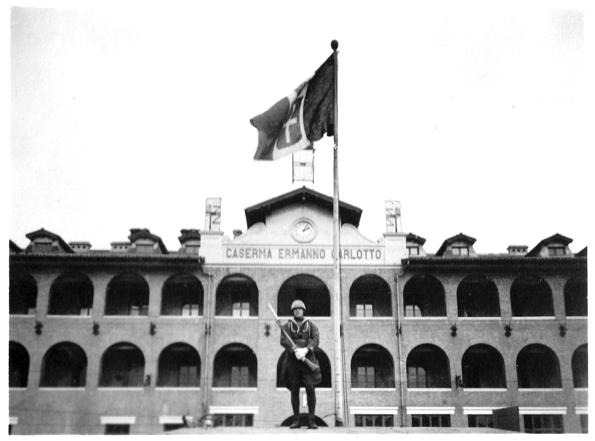 Caserma Ermanno Carlotto a Tientsin, nell'anno 1939